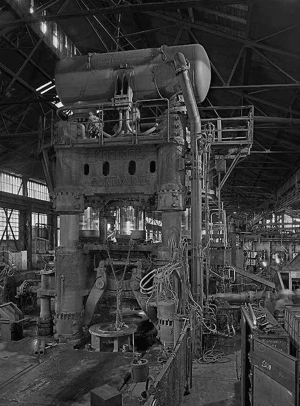 Die demontierte und wiedererrichtete 6000t-Presse des Bochumer Vereins